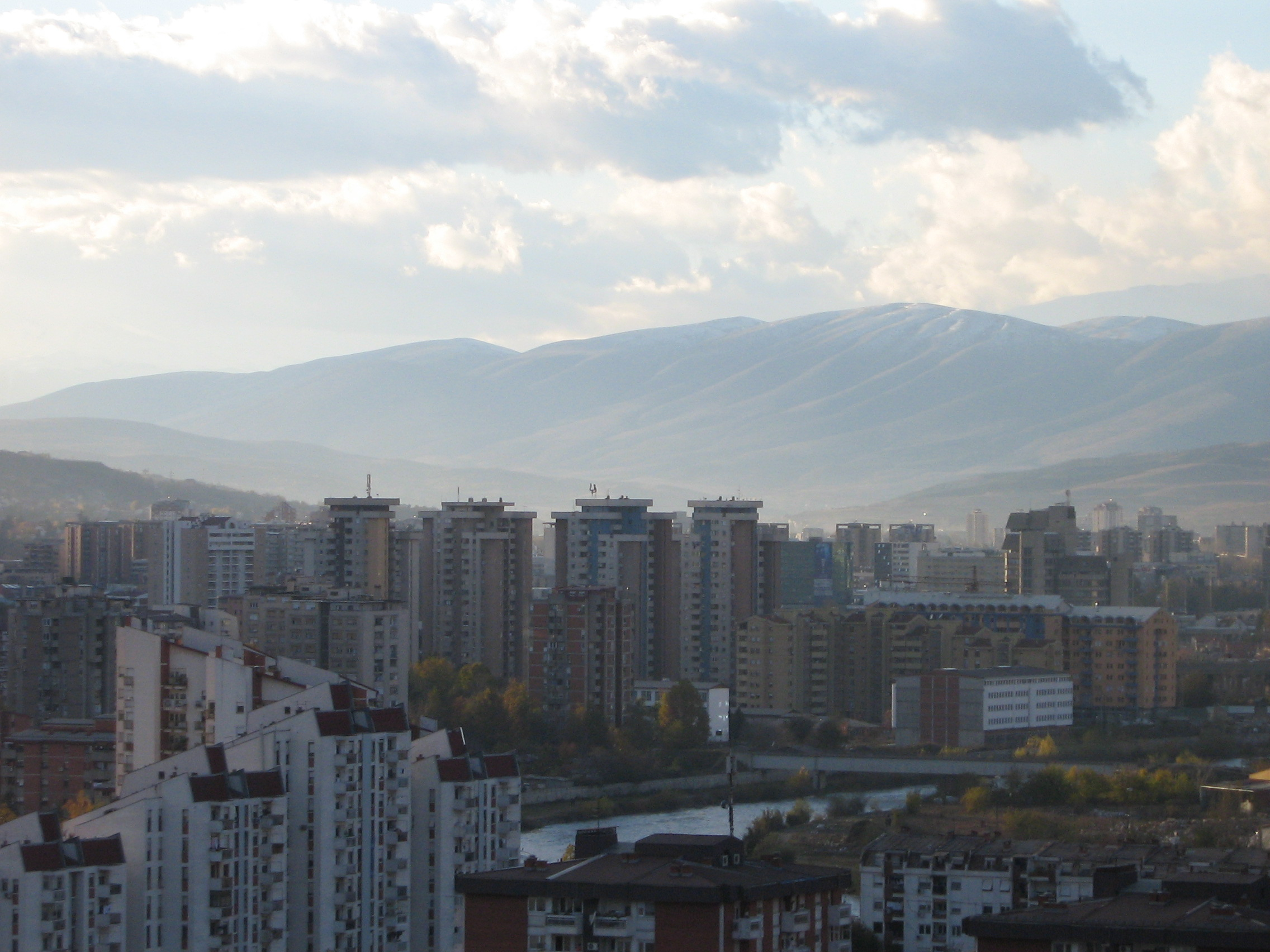 Висококатници во Скопје